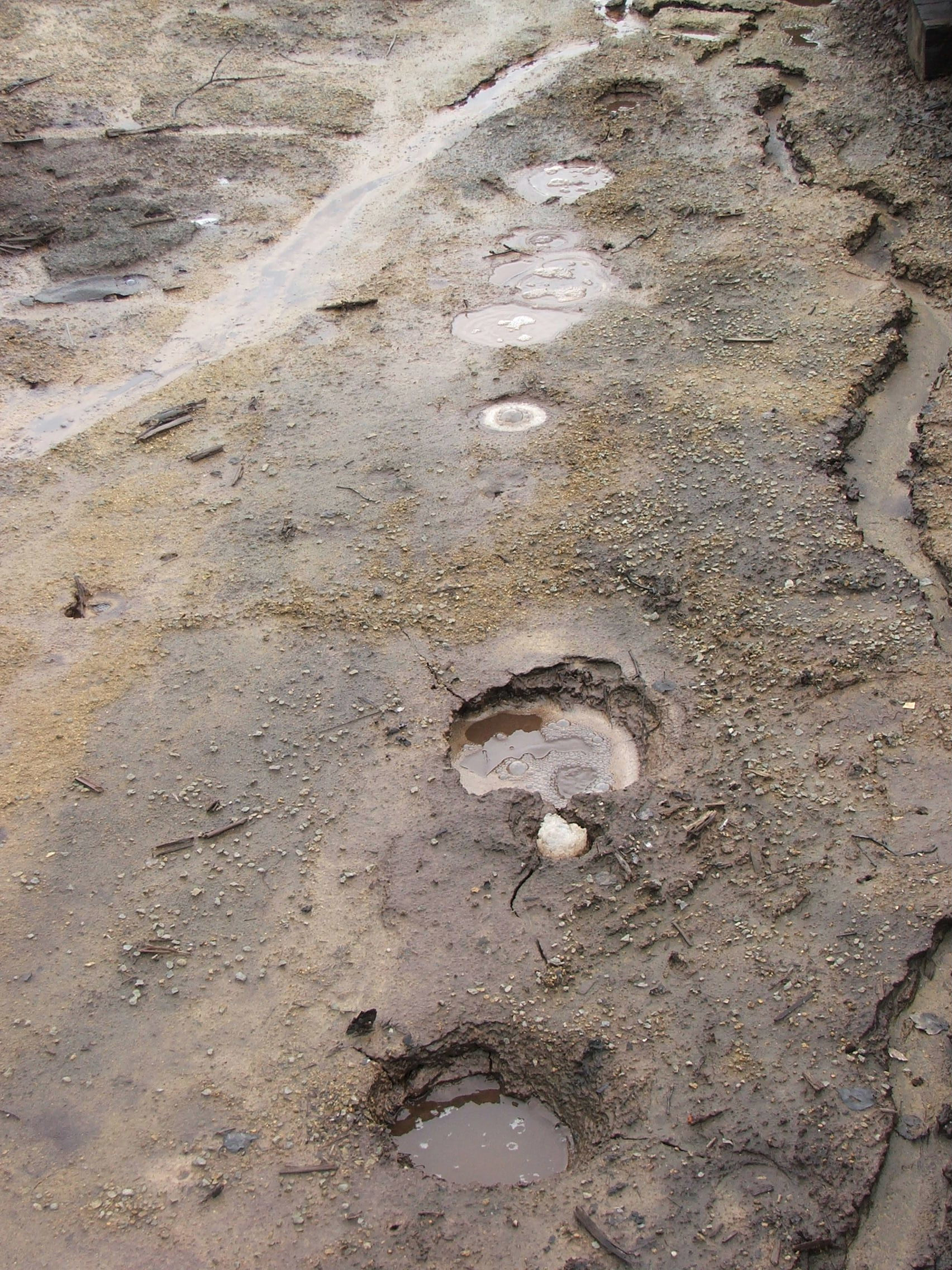 Entlang einer Linie aufgereihte Mofetten